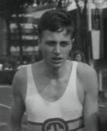 Nederlandse kampioenschappen atletiek te Rotterdam. Frans Luitjes wint de 100m hardlopen voor heren.